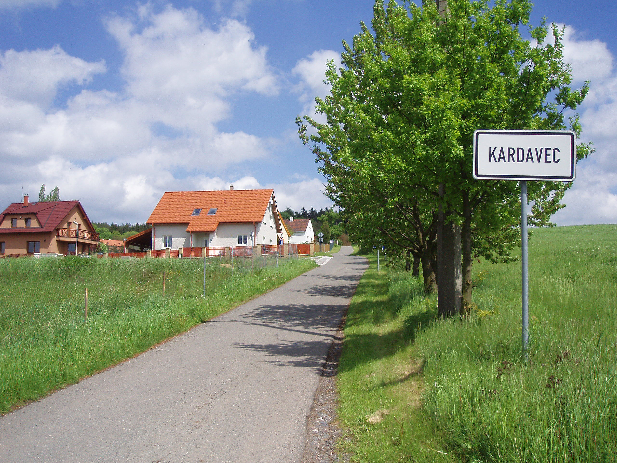 Víska Kardavec